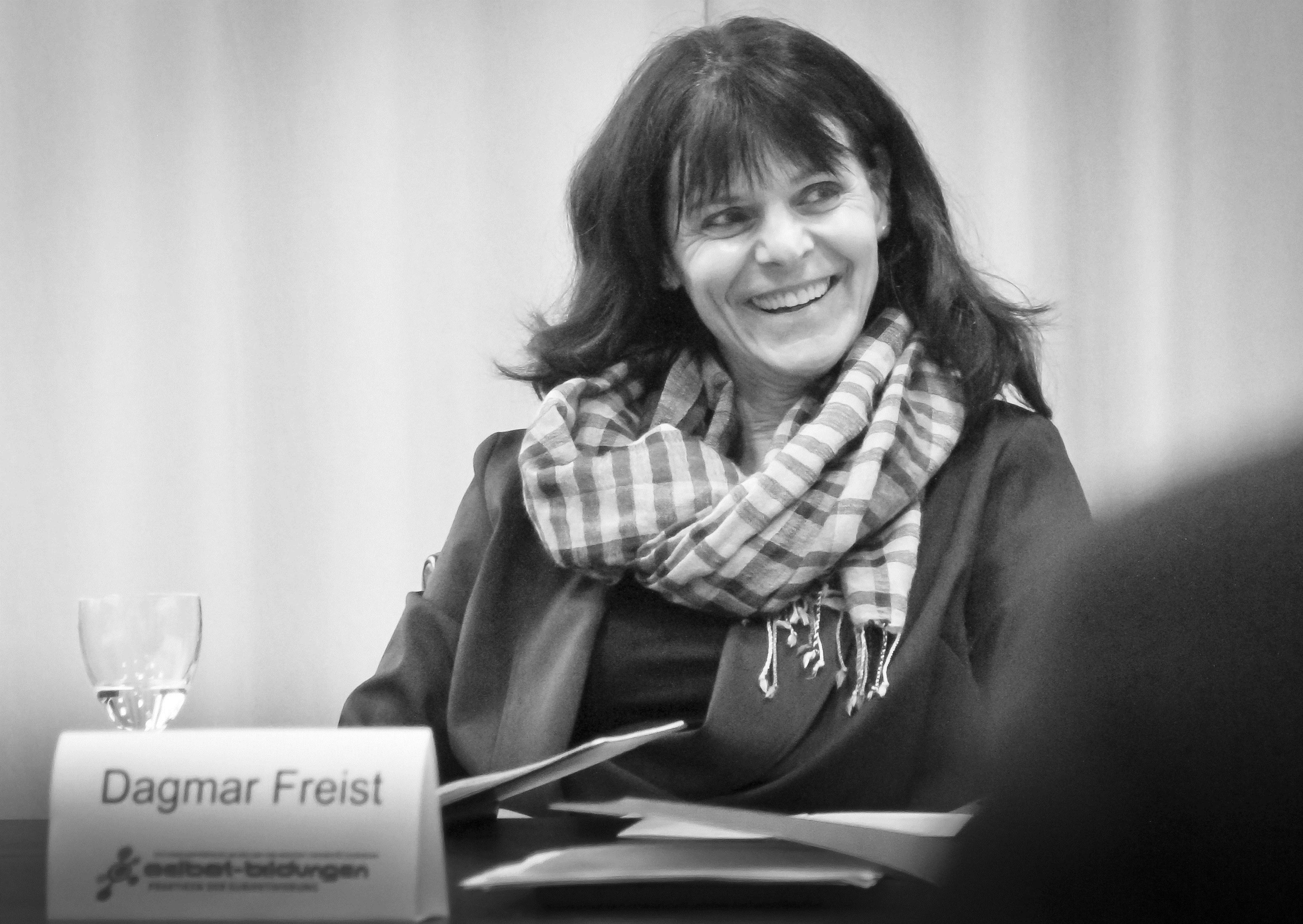 Dagmar Freist auf der Konferenz "Praktiken der Selbst-Bildung im Spannungsfeld von ständischer Ordnung und gesellschaftlicher Dynamik"